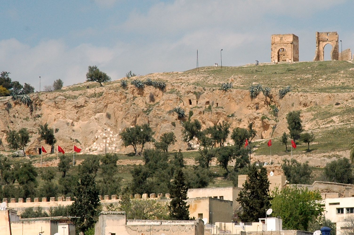 Fes - Tombes marínides